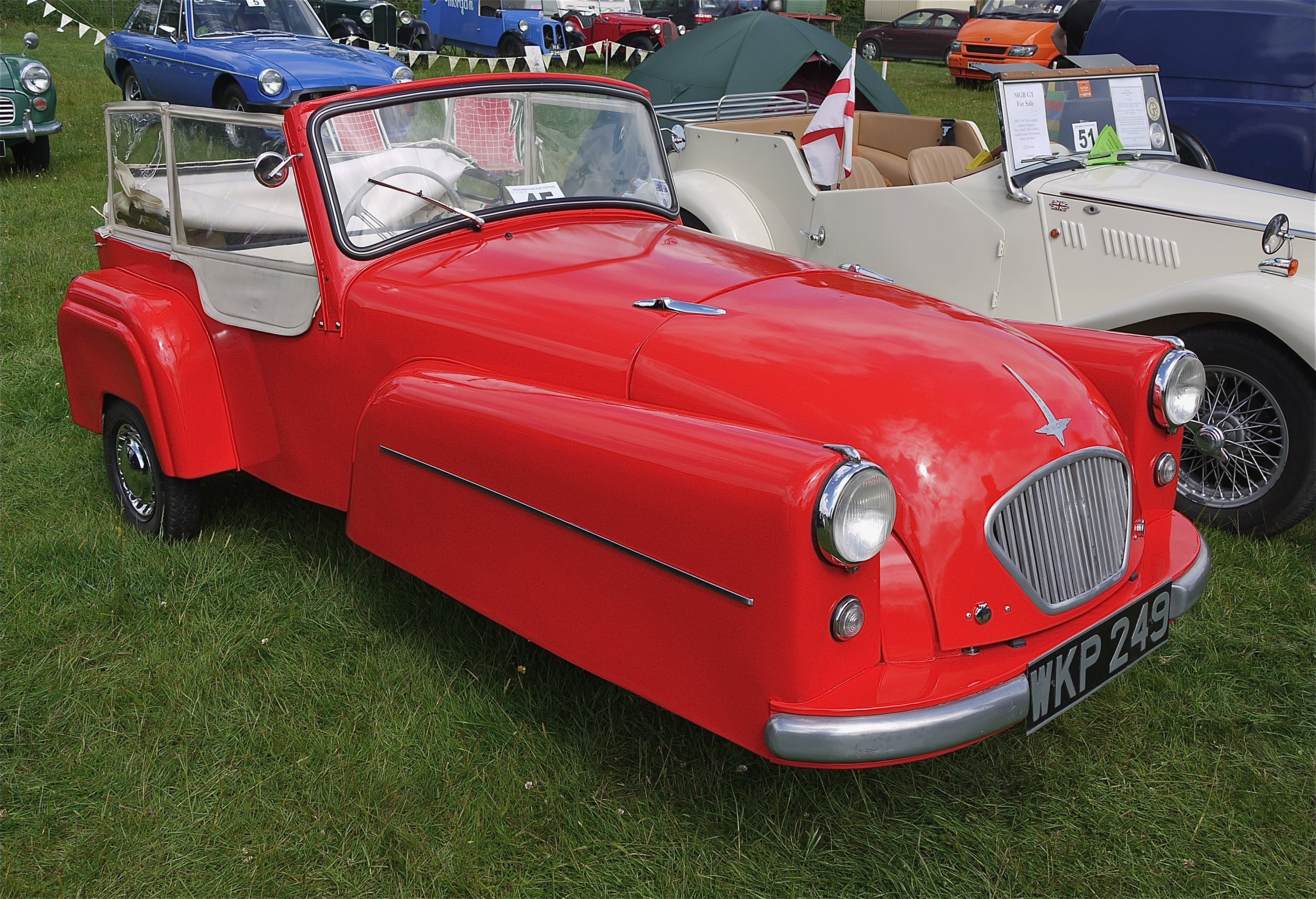 Panasonic G1 14-45 Lens